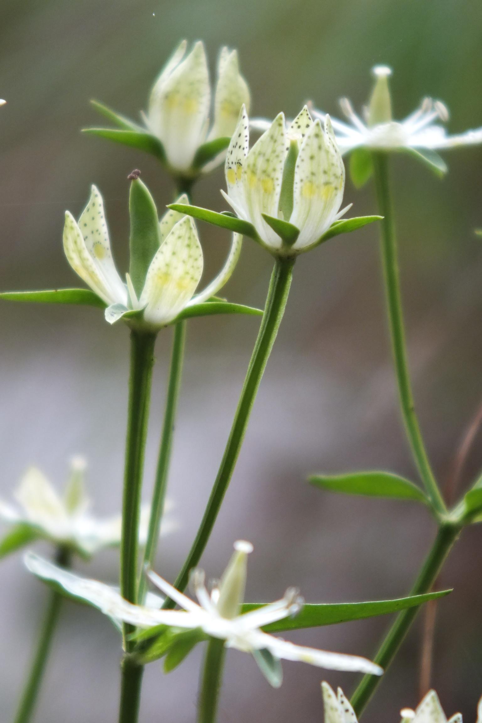 Swertia bimaculata アケボノソウ 曙草 篠山市